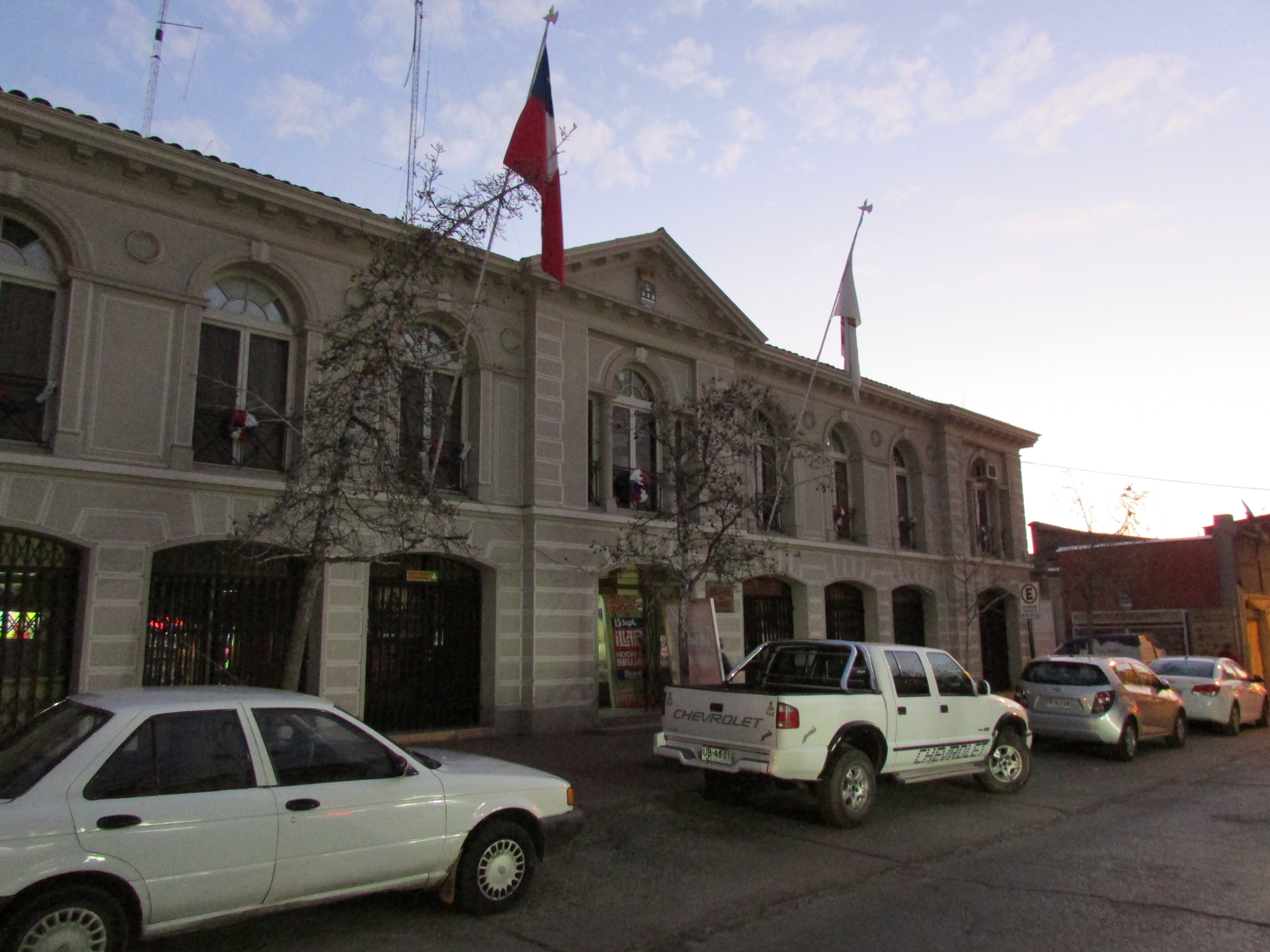 Centro histórico de Los Andes This is a photo of a national monument in Chile: 893